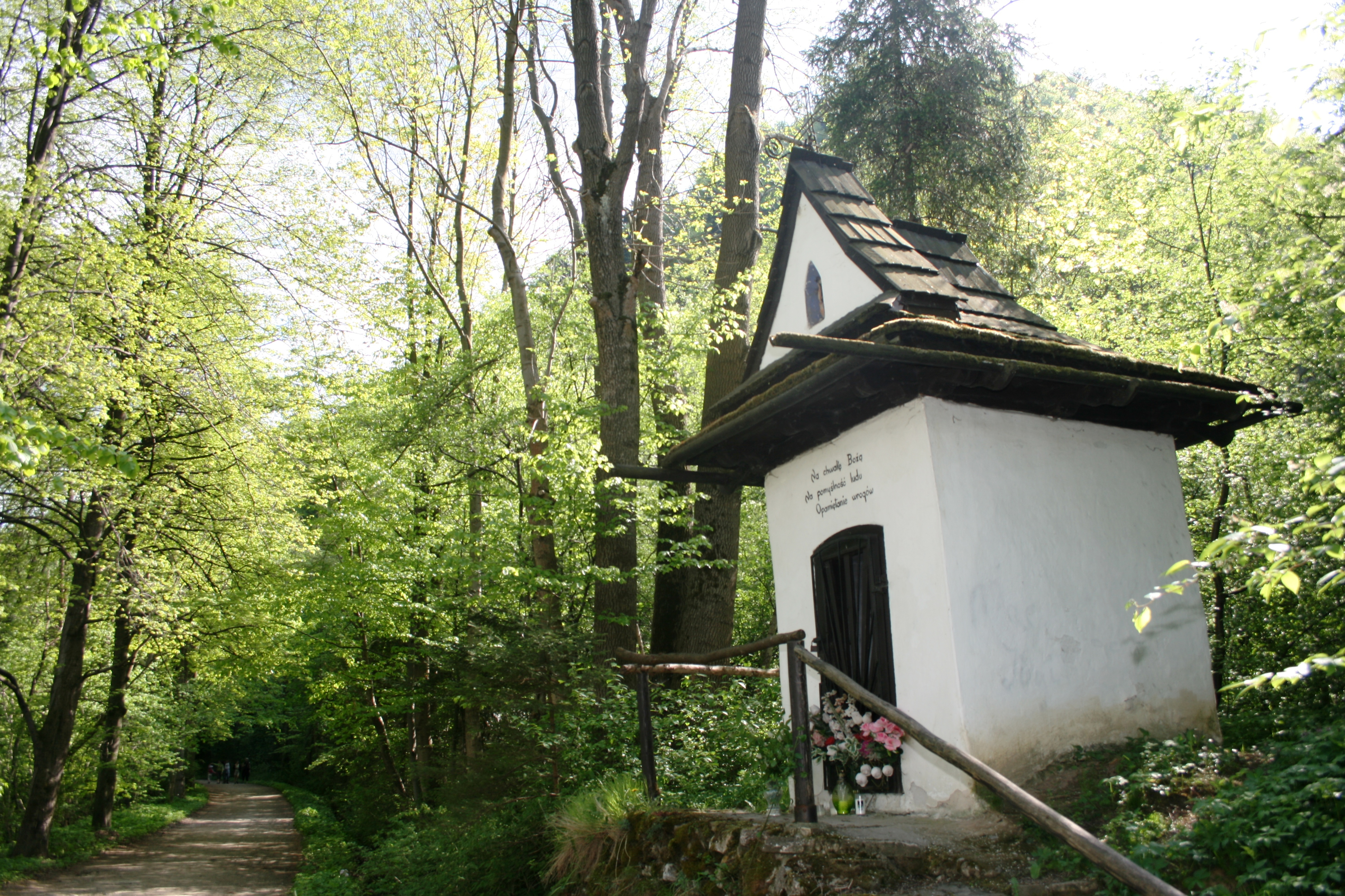 Kapliczka Św. Kingi w Krościenku nad Dunajcem - widok od północy